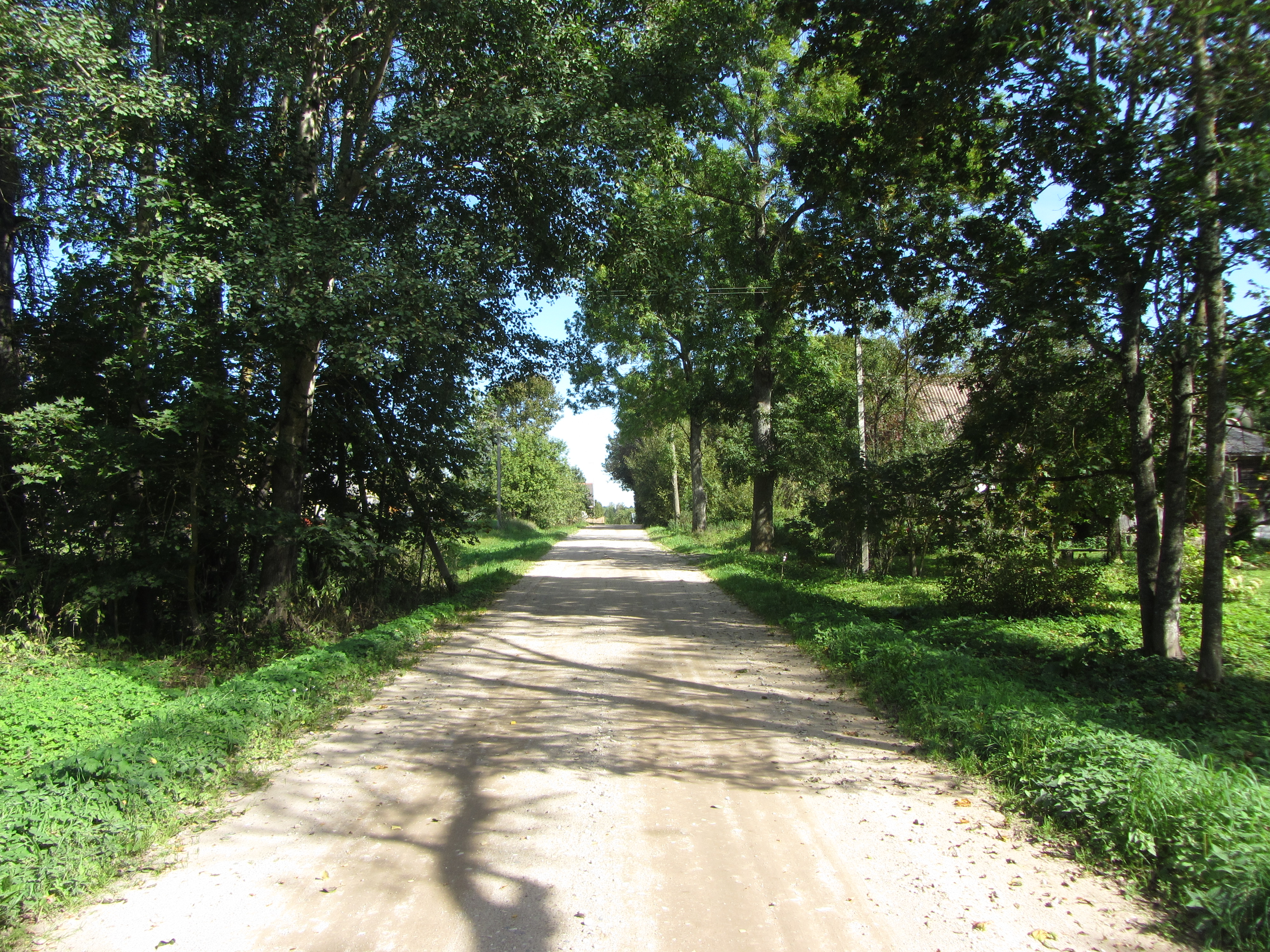 Pupiniai 30284, Lithuania